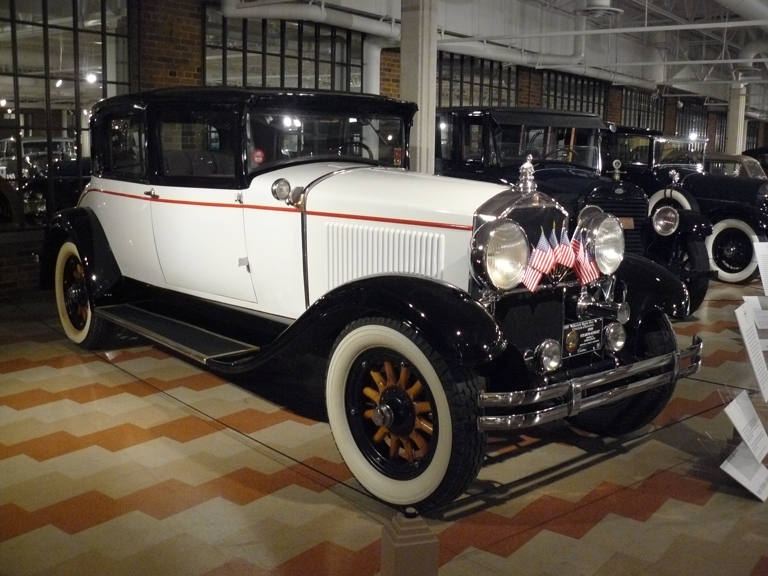 Auburn Muséum 2013.